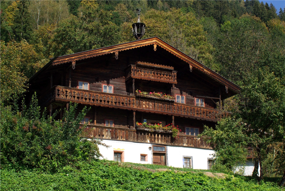 Bauernhaus, Ferchlgut